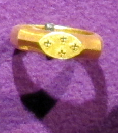 Tesoro di principe gepidico di apahida (1889), anello con 4 croci, 480-500 ca.